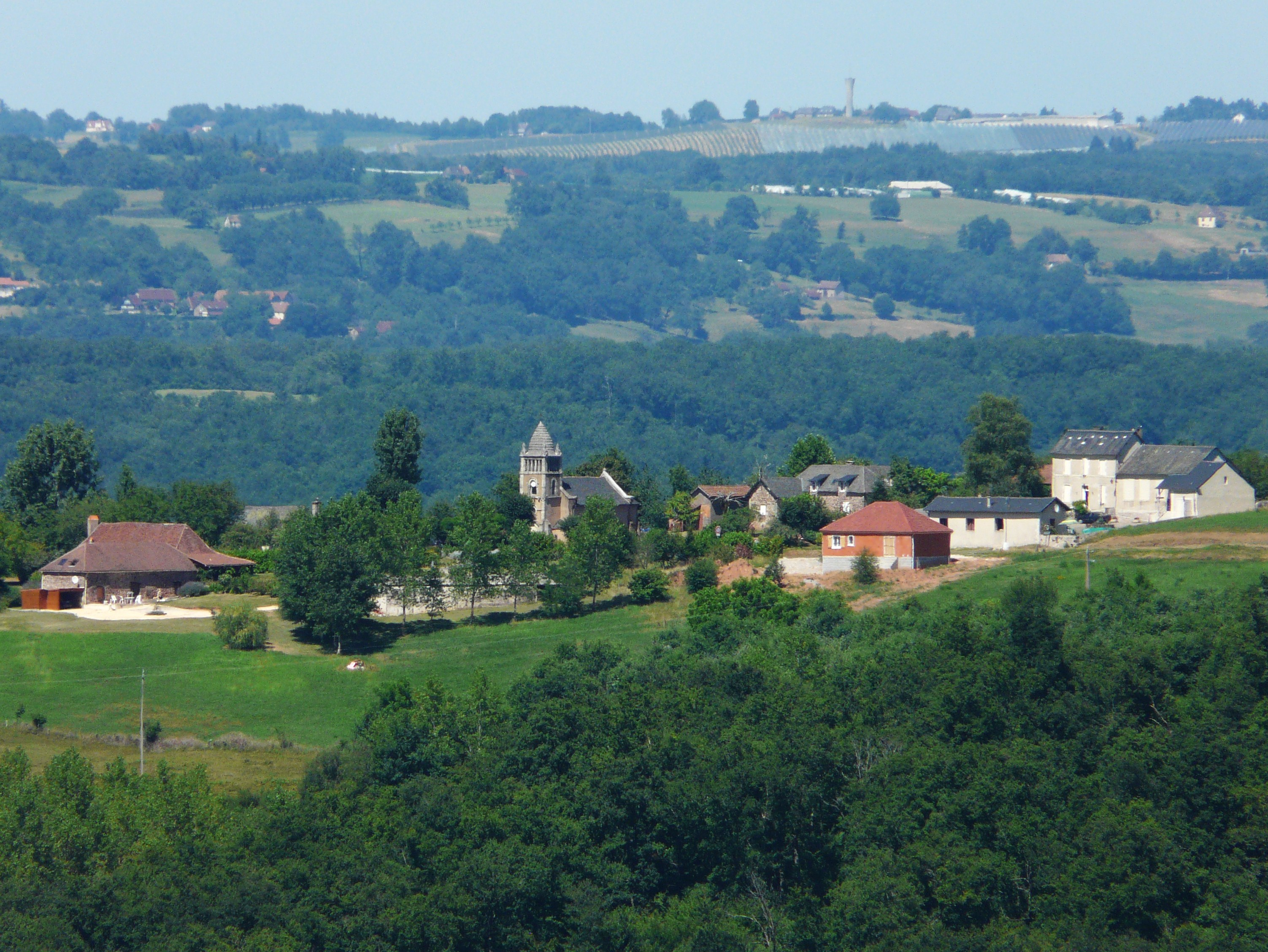 Le village de Teillots, Dordogne, France. Vue prise depuis la table d'orientation de Raffaillac à Badefols-d'Ans.